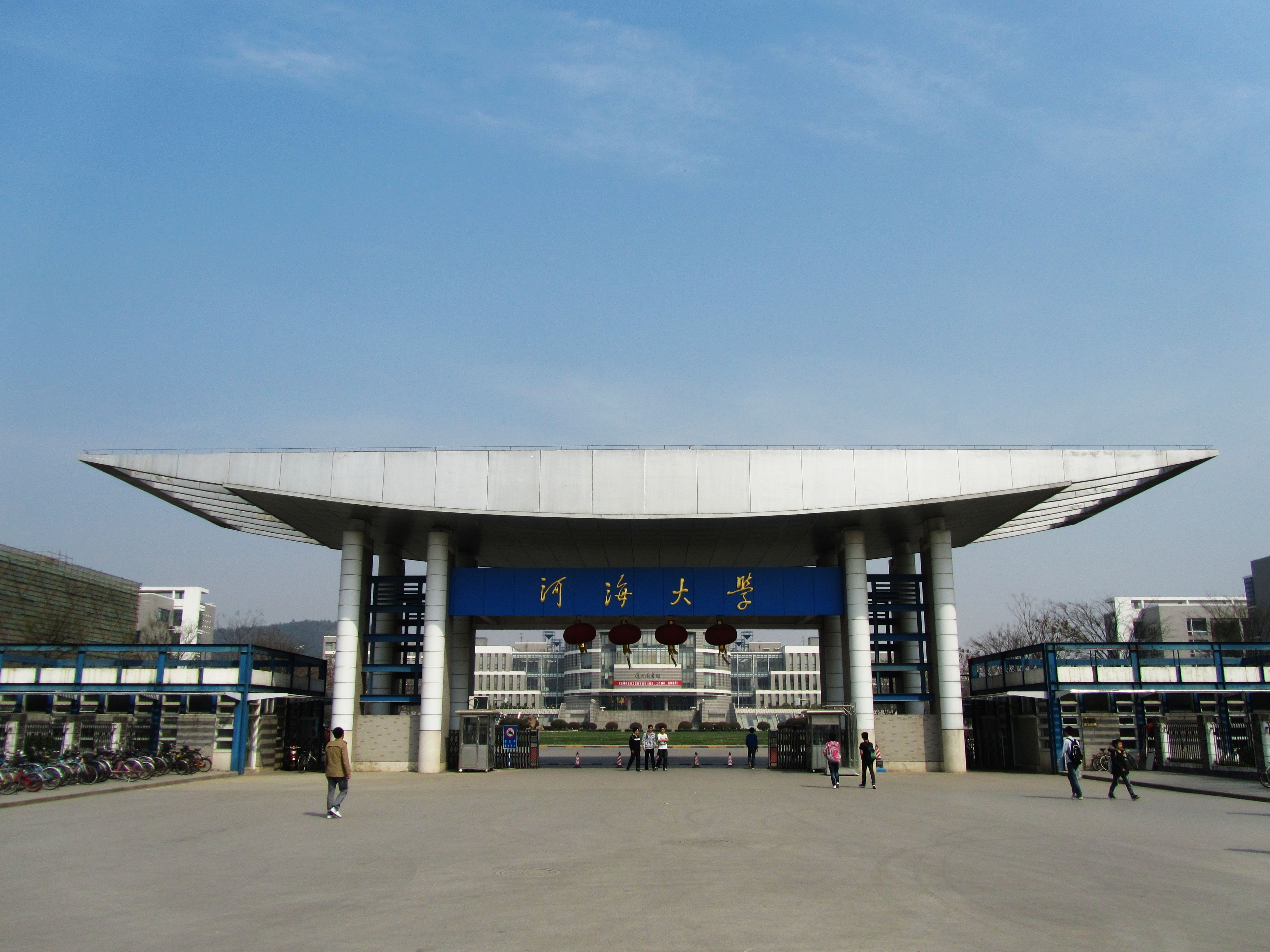 河海大学江宁校区主校门。